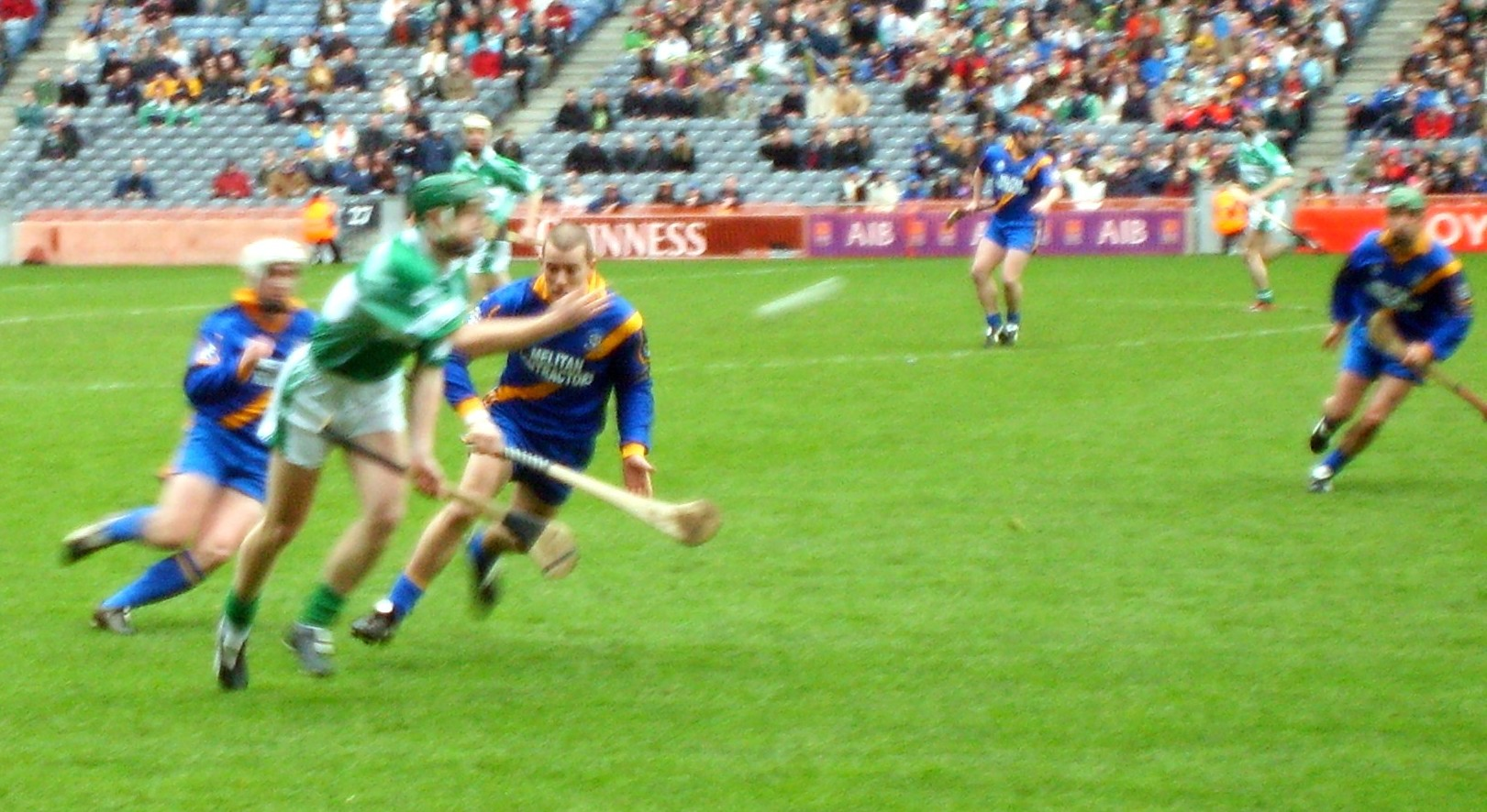 Beschreibung: Hurling im Croke Park (All Irish Club Finals 2007) Quelle: Bild selbst erstellt Date: 17.03.2007 Autor: Martin Brückner